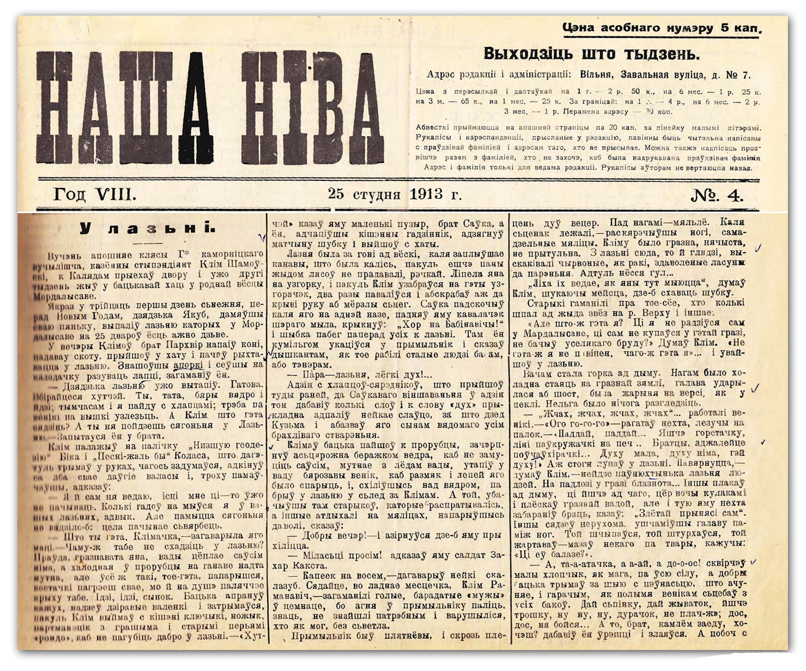 Беларуская (тарашкевіца): «У лазьні», апавяданьне Максіма Гарэцкага. Наша ніва. 25 студзеня 1913 г.